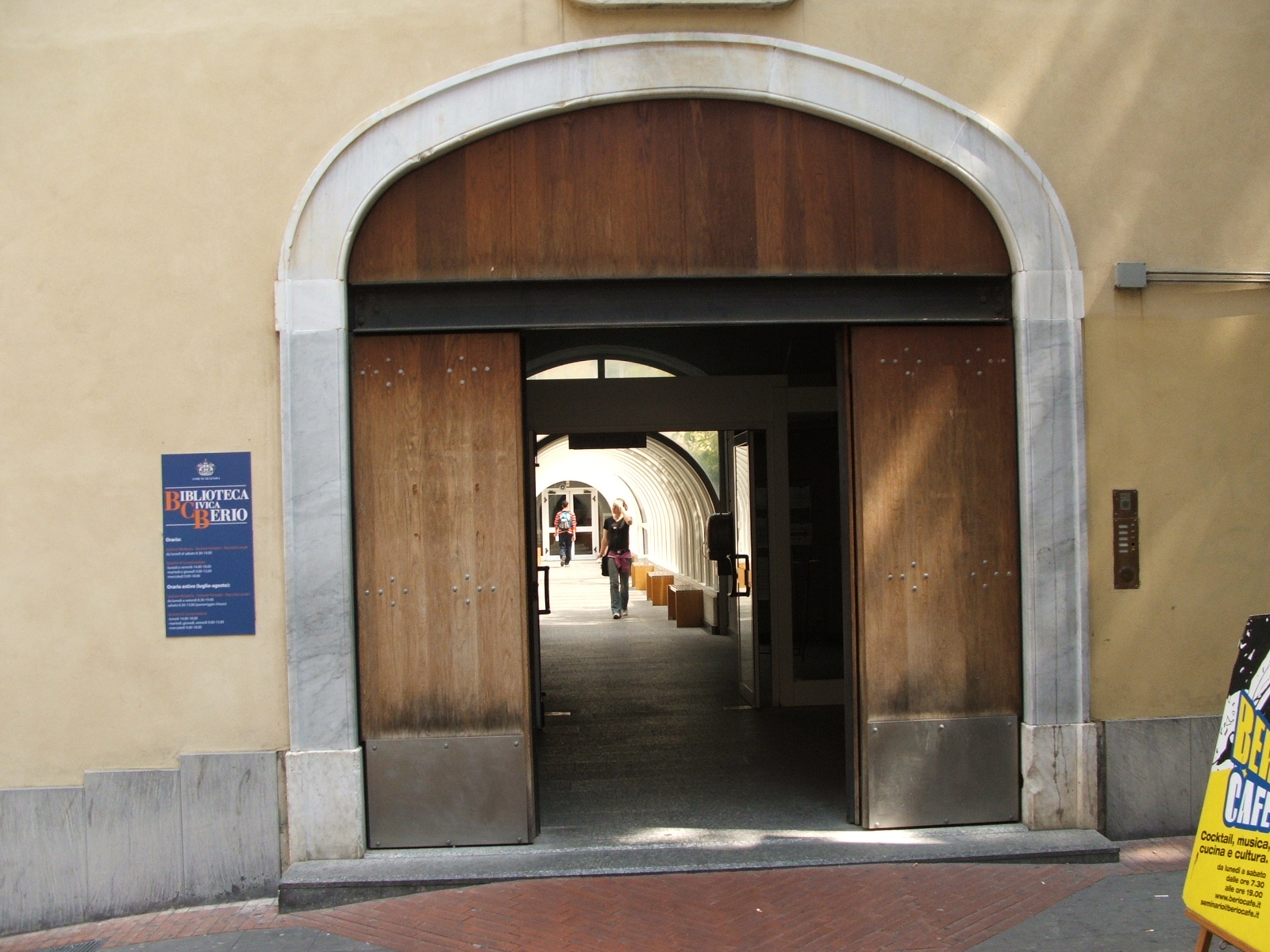 Genova, Biblioteca Berio